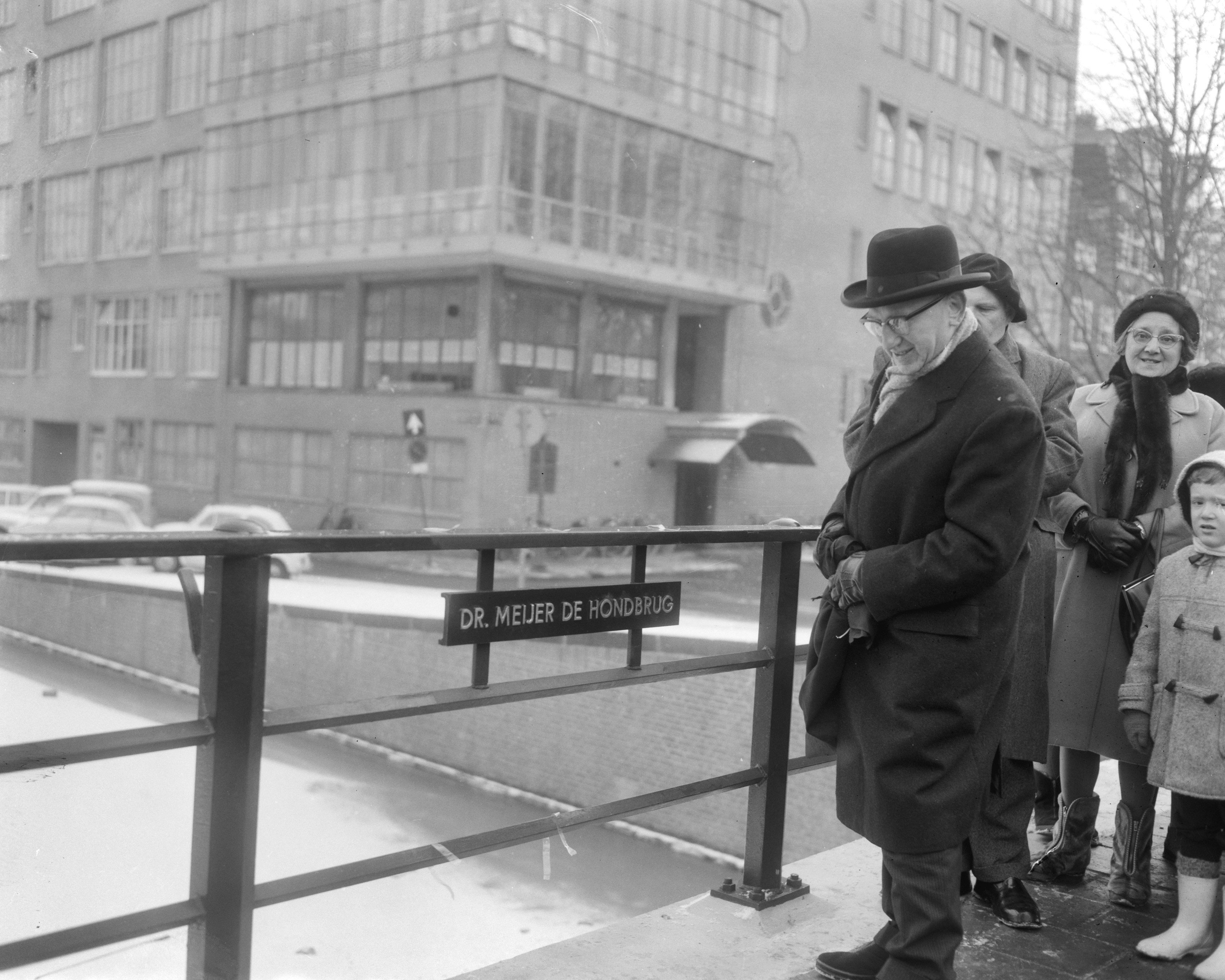 Collectie / Archief : Fotocollectie Anefo Reportage / Serie : [ onbekend ] Beschrijving : Weesperstraatbruggen krijgen namen, de heer Ben Italiaander onthult dr. Meijer de Hond brug Datum : 15 januari 1966 Trefwoorden : bruggen, onthullingen Persoonsnaam : dr. Meijer de Hond brug Fotograaf : Bilsen, Joop van / Anefo Auteursrechthebbende : Nationaal Archief Materiaalsoort : Negatief (zwart/wit) Nummer archiefinventaris : bekijk toegang 2.24.01.04 Bestanddeelnummer : 918-6801